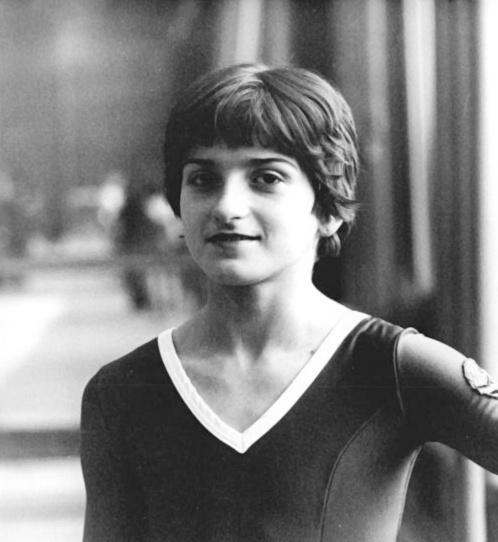 Regina Grabolle ADN-ZB Mittelstädt 21.5.80 Berlin: DDR-Turnmeisterschaften -Mit ausgezeichneten 38,80 Punkten sicherte sich die Titelveteidigerin Regina Grabolle die Führung nach der Pflicht. Die 15jährige Dynamo-Sportlerin turnte zweimal 9,65 Punkte (Barren und Boden), erhielt für ihren Sprung 9,7 Punkte und am Balken sogar 9,8 Punkte.